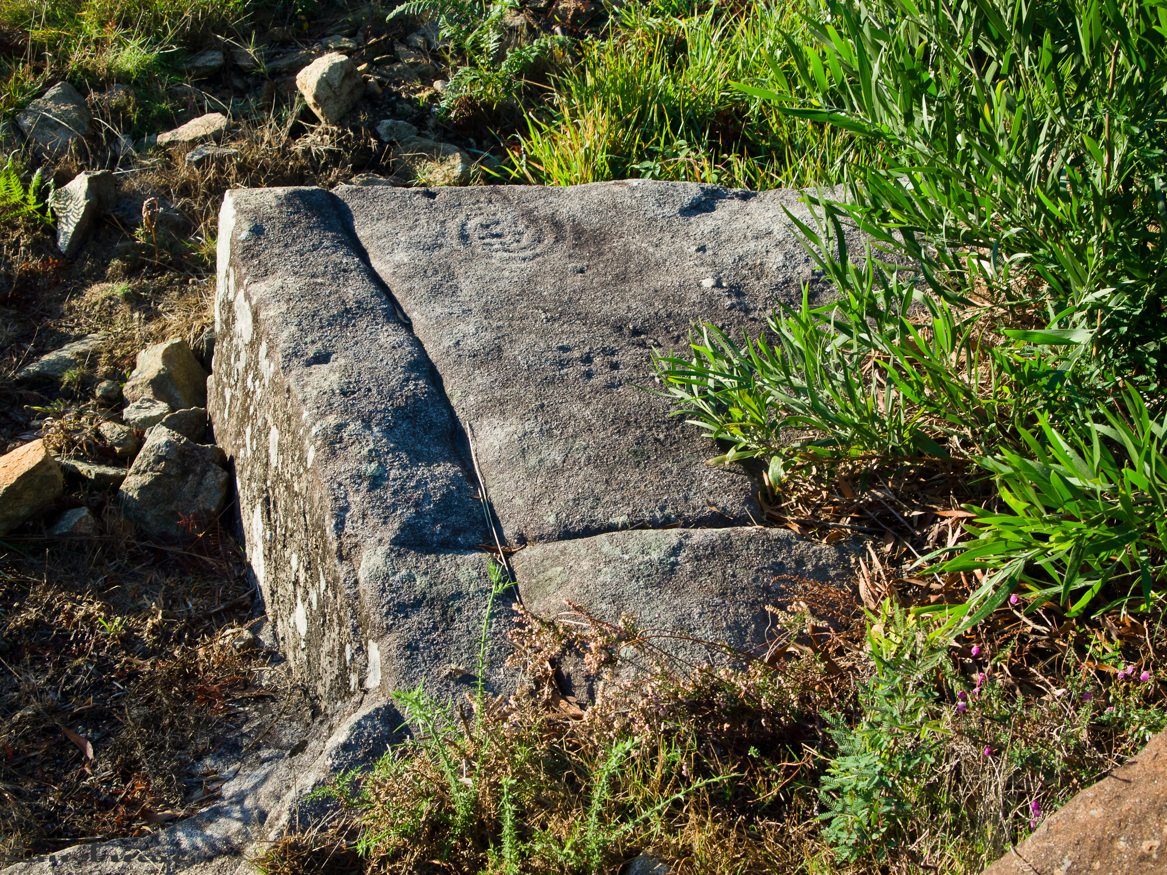 Petróglifos do Monte Penide - Negros - Redondela